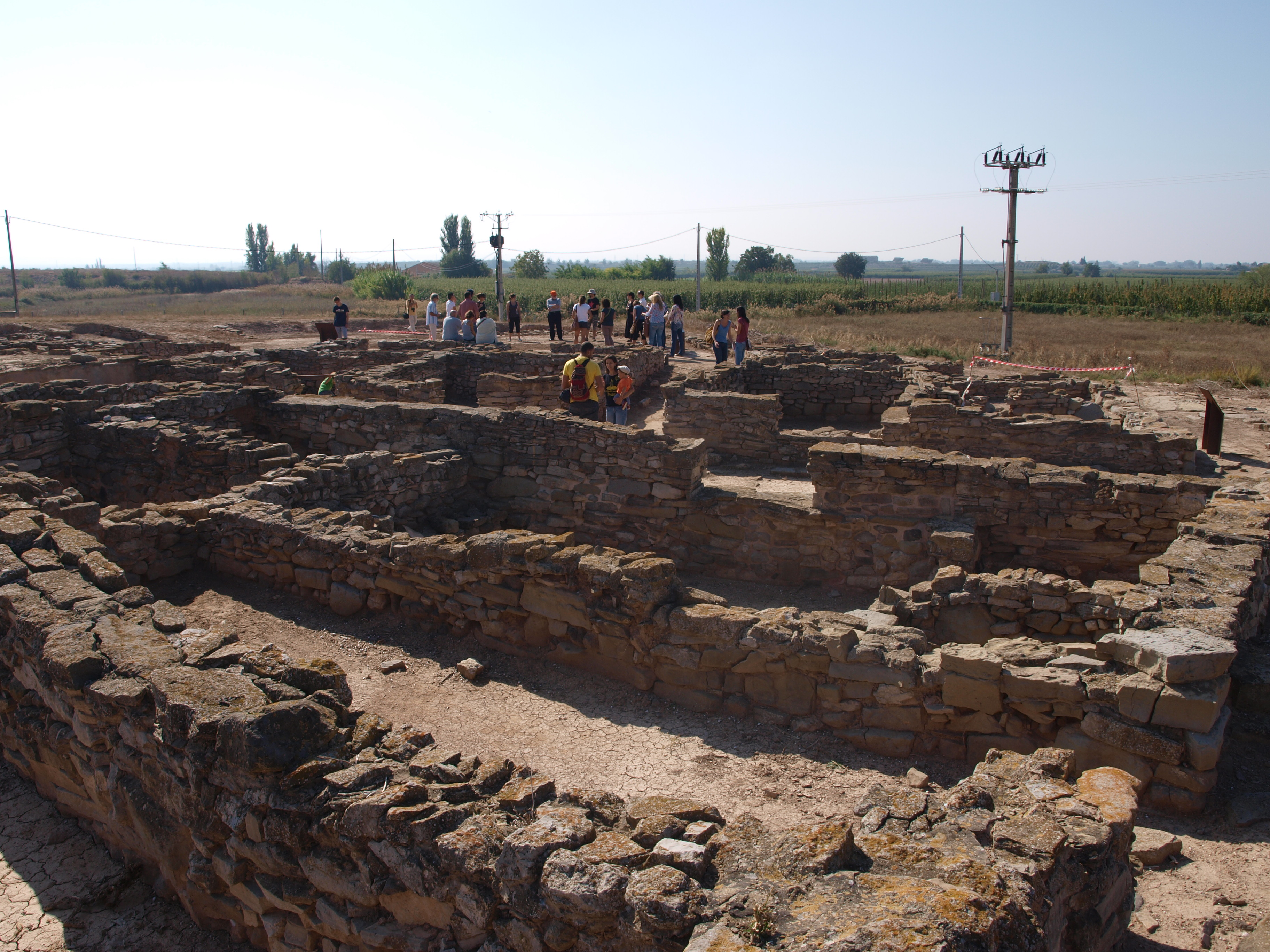 Vista parcial del poblat ibèric del Molí d'Espígol (Tornabous)